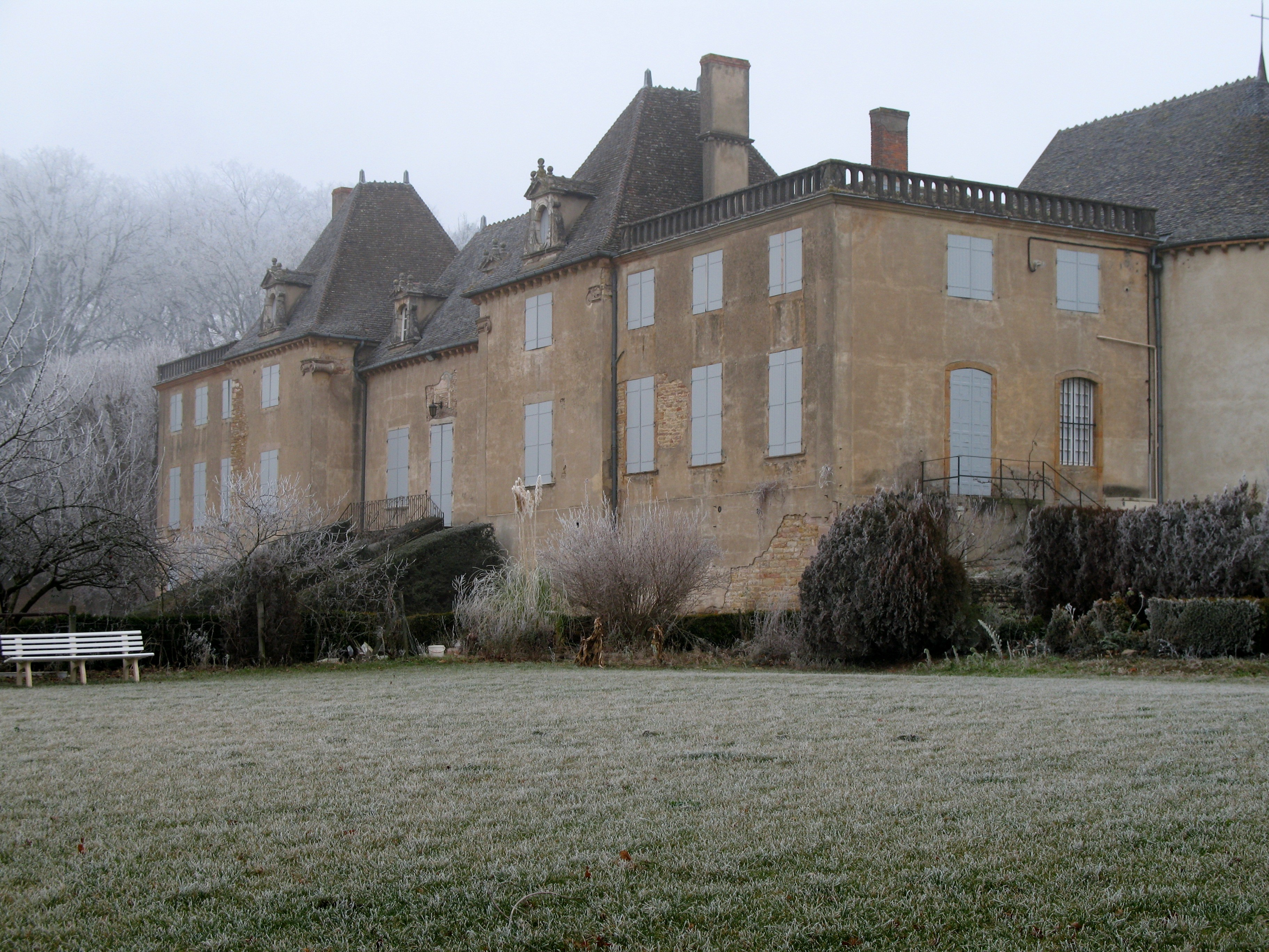 château de Monceau - Prissé (Saône-et-Loire)